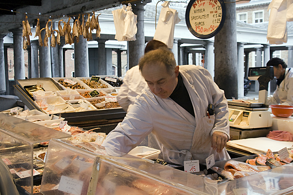 De oude vismarkt in Brugge